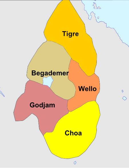 Division d'Etiopia a la fin dau Temps dei Princes (vèrs 1850).